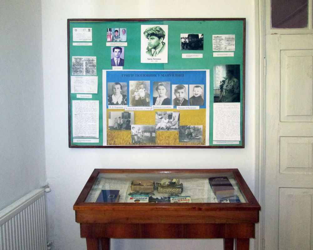 Частина експозиції Мануйлівського літературно-меморіального музею Максима Горького (село Верхня Мануйлівка, Козельщинський район, Полтавська область, Україна), присвячена Григіру Тютюннику. Вестибюль музею.